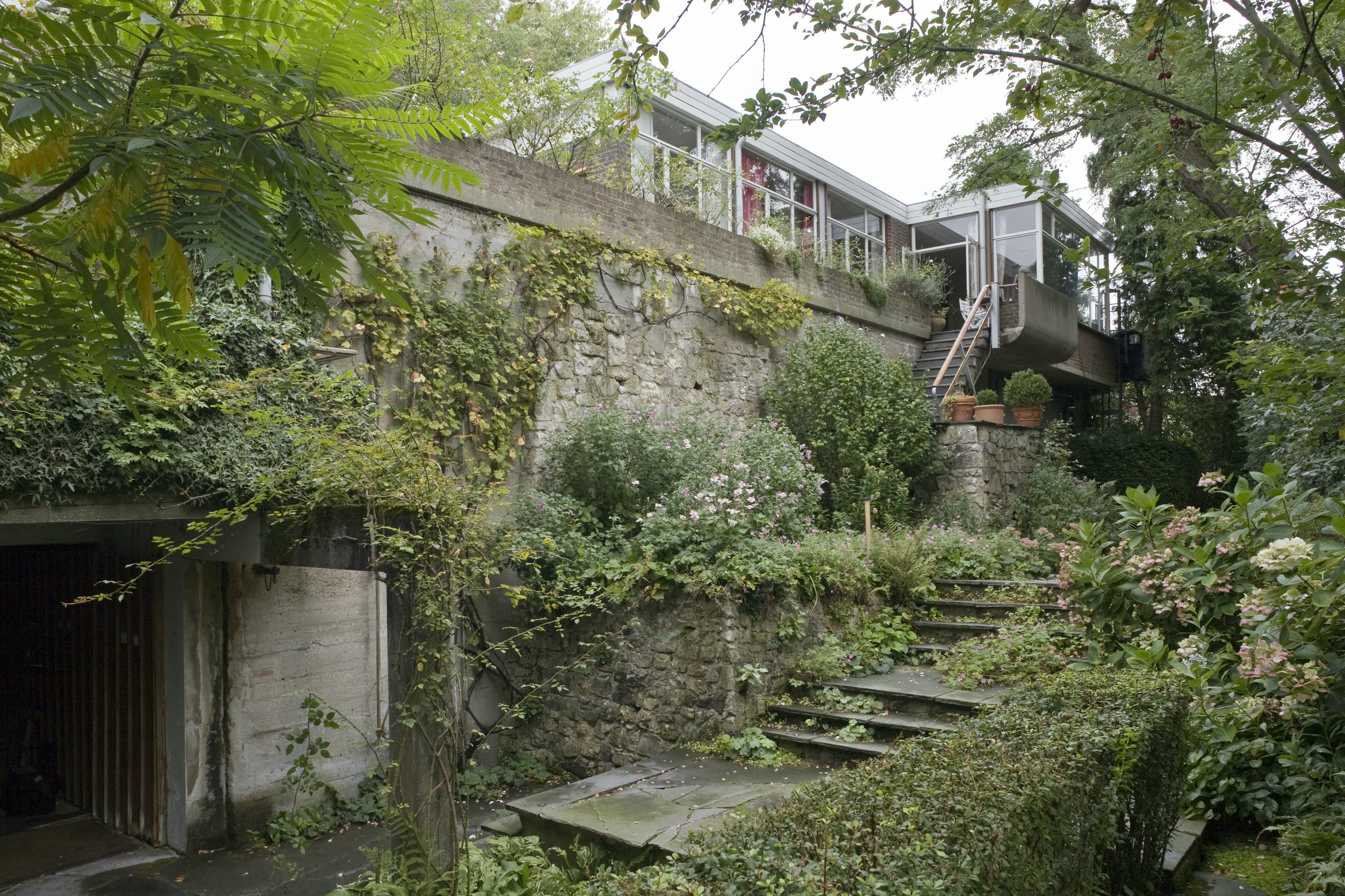 Bunkerhuis: Overzicht van de achtergevel, gezien vanuit de tuin (opmerking: Gefotografeerd voor Monumenten van Herrezen Nederland, bladzijde 17)